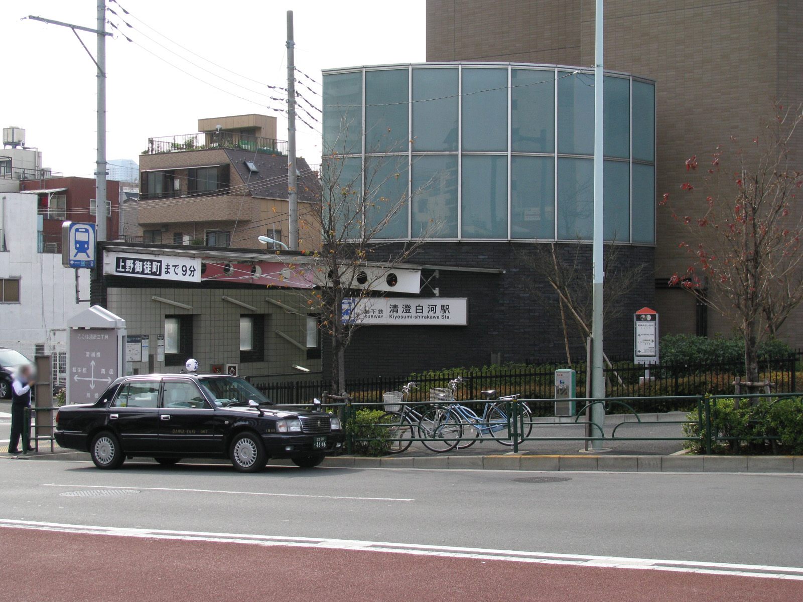 都営清澄白河駅の駅出入り口の一つ。高橋付近にある。